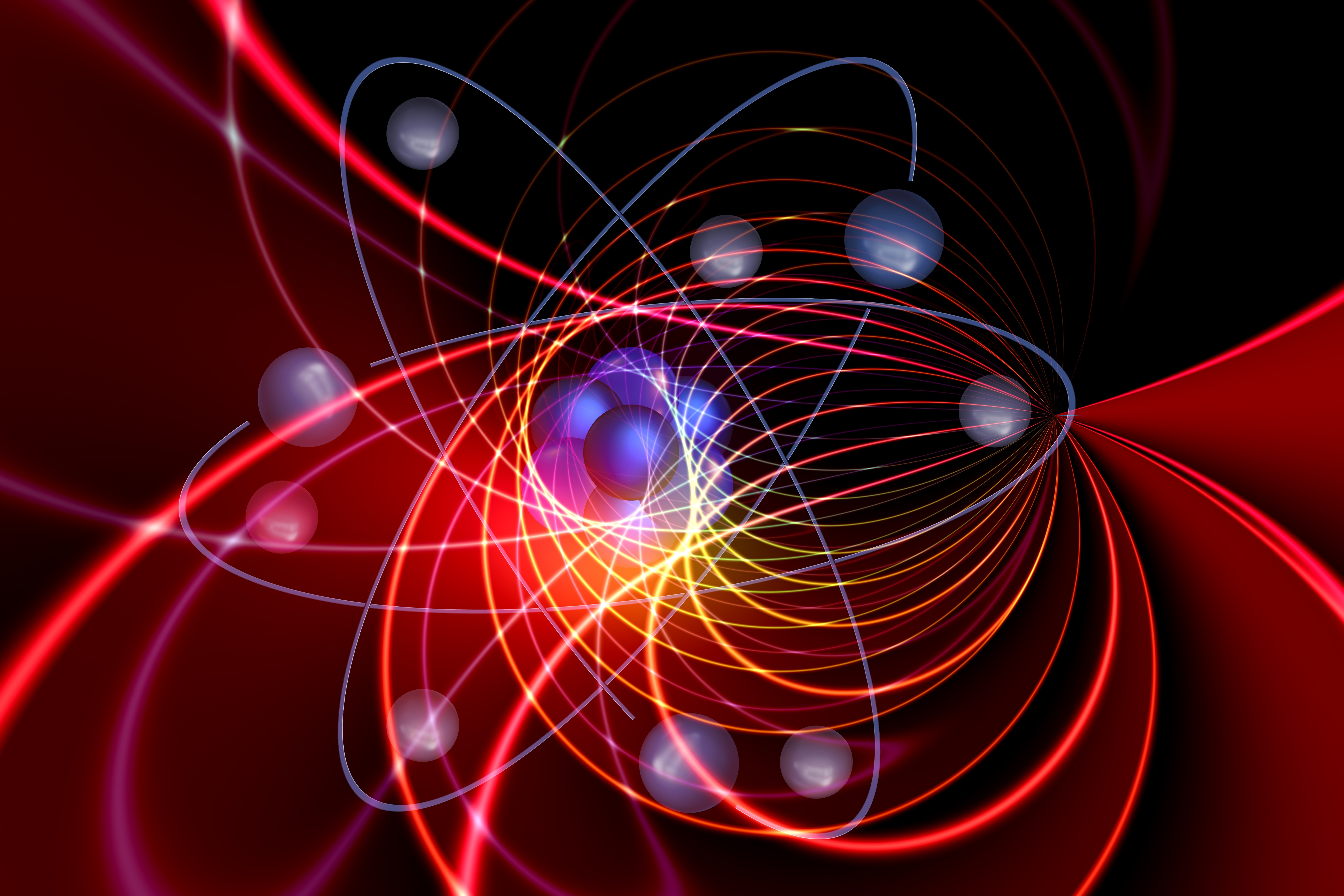 Картинка по запросу атом